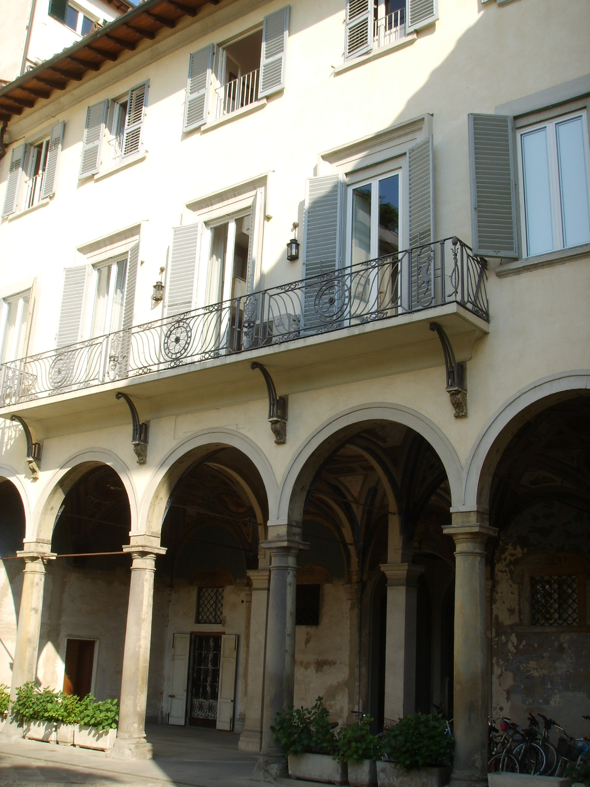 Palazzo_caccini in Florence